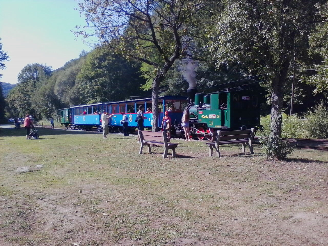 Vlak s parnou lokomotívou Katka na Alpinke pripravený na návrat do Čermeľa.